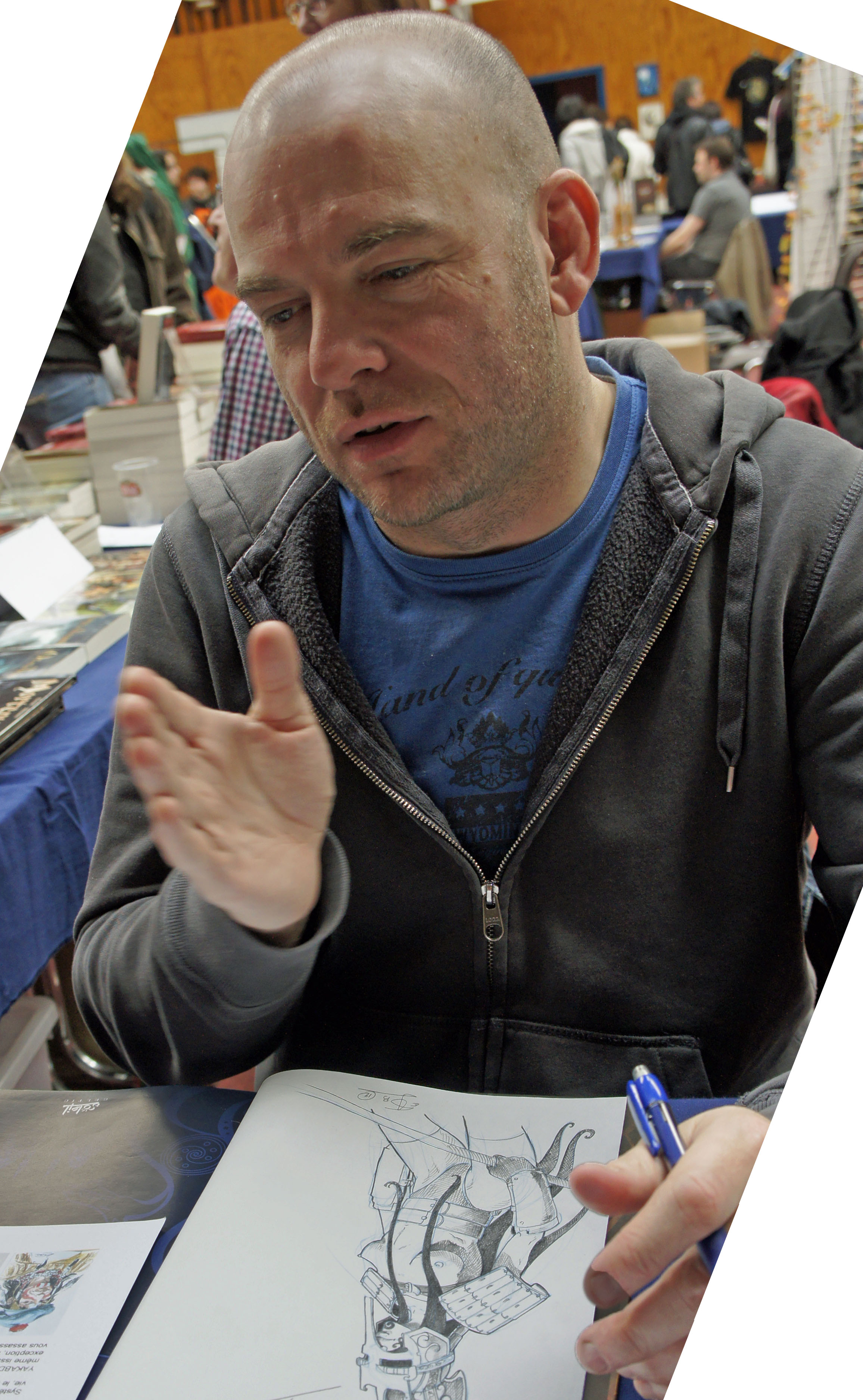 Erwan Seure Le Bihan lors du Printemps des Légendes 2012.